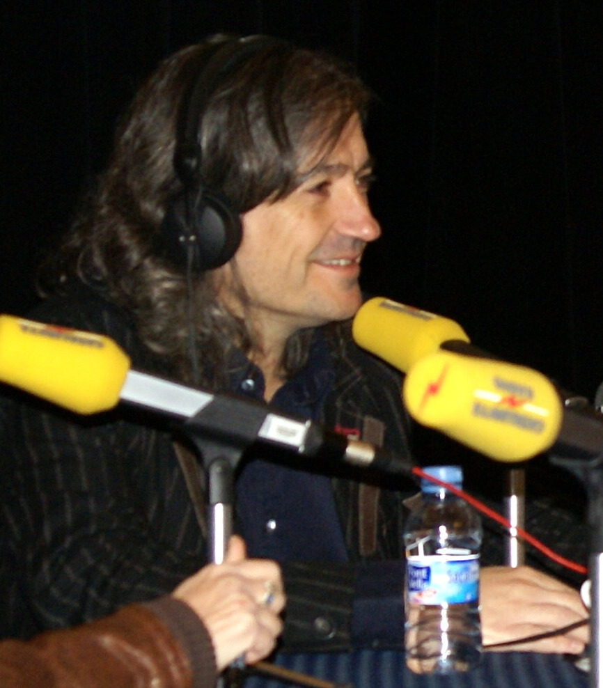 Entrevista a l'alcalde de Vilanova en un programa de Catalunya Ràdio